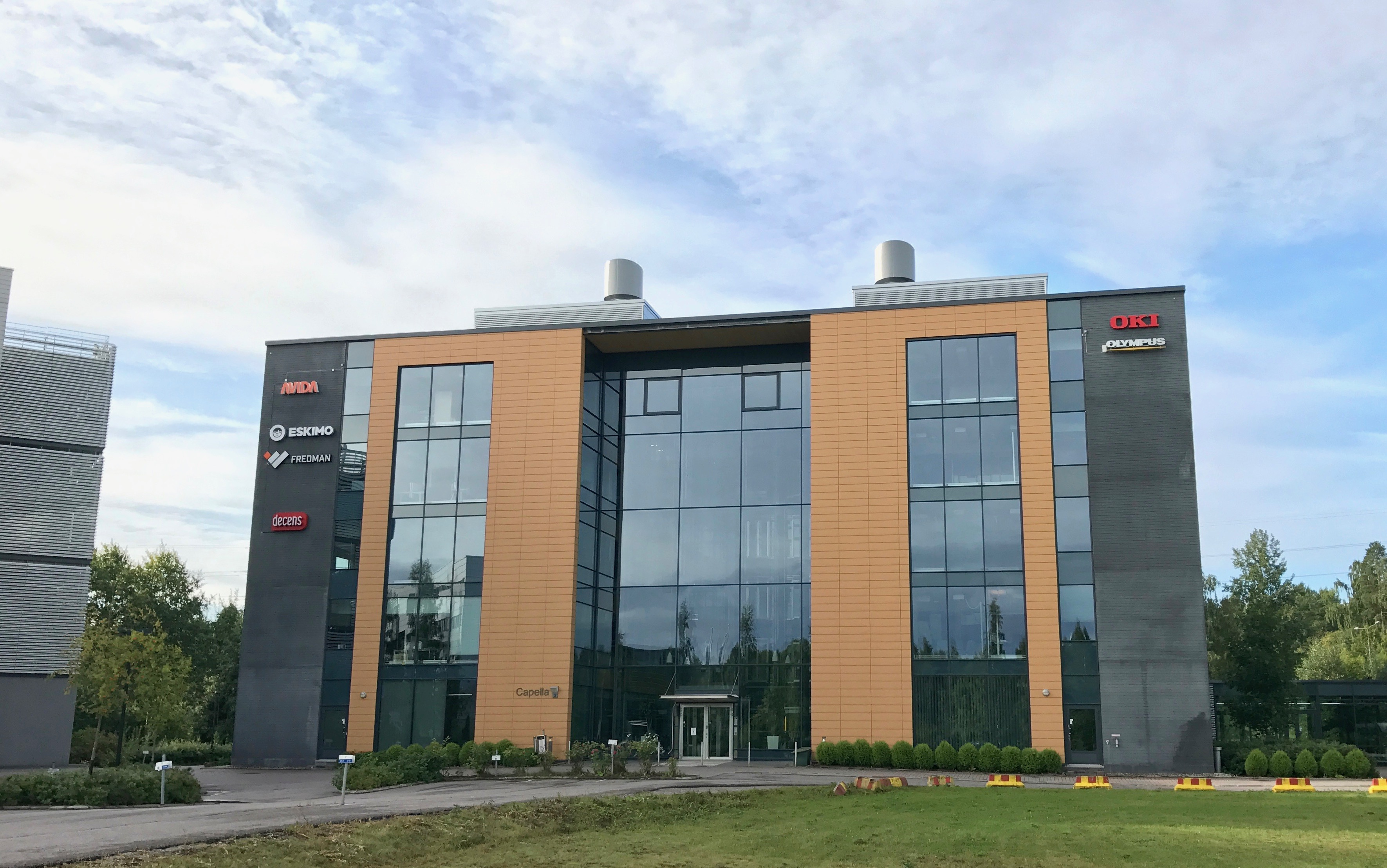 Polaris Business Parkin toimistorakennus Capella Espoon Leppävaarassa, osoitteessa Vänrikinkuja 3.